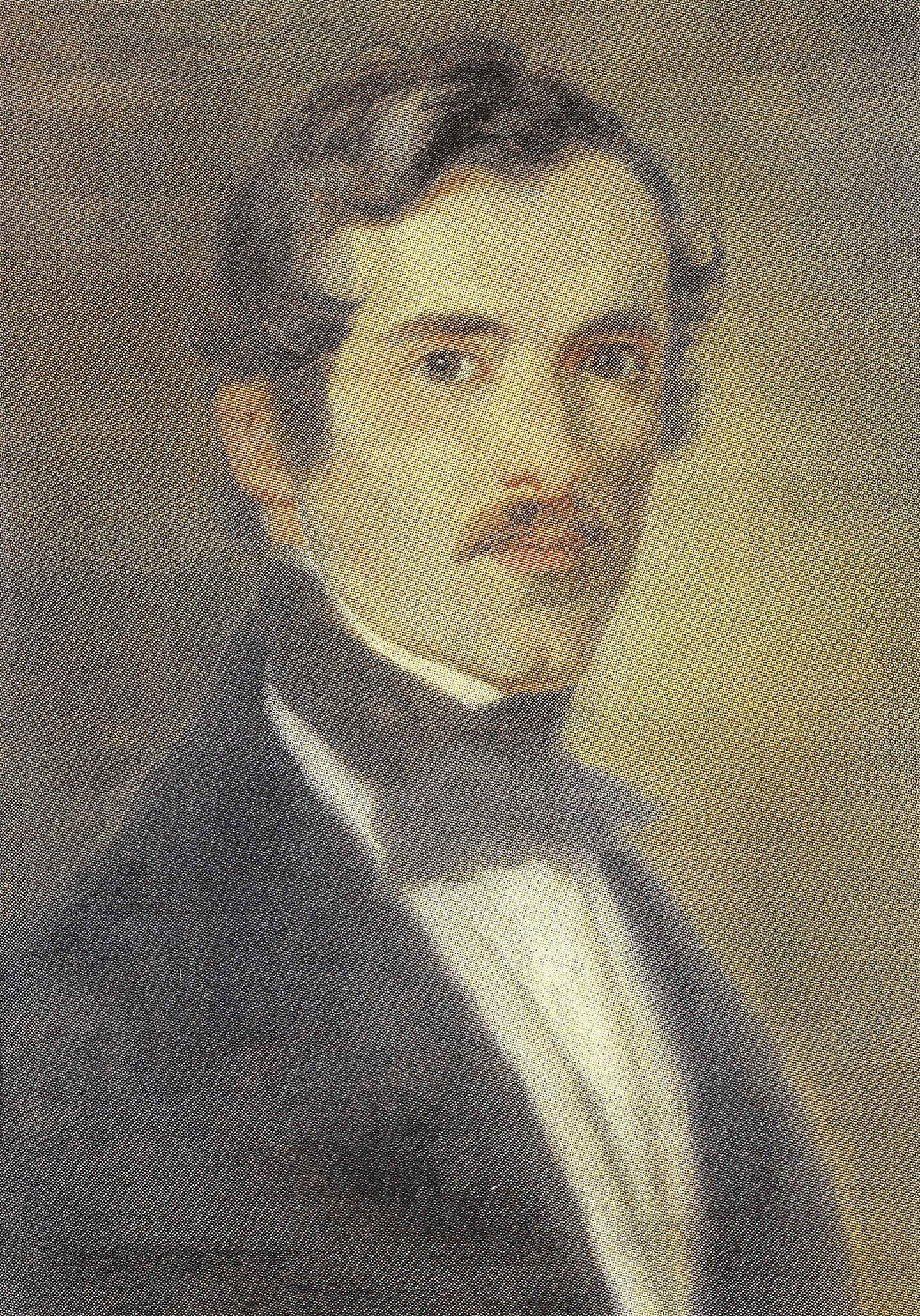 Johann Andreas von Sprecher (1819–1882), Bündner Historiker und Schriftsteller.